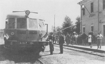 La stazione ferroviaria di Orzinuovi nel 1950, all'inaugurazione del ponte sull'Oglio ricostruito dopo le distruzioni belliche.